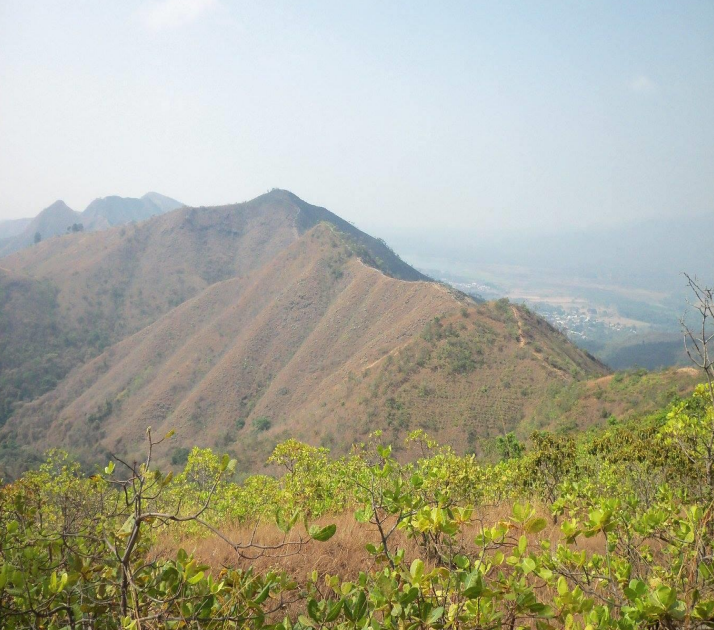 Vista del Cerro Casupo